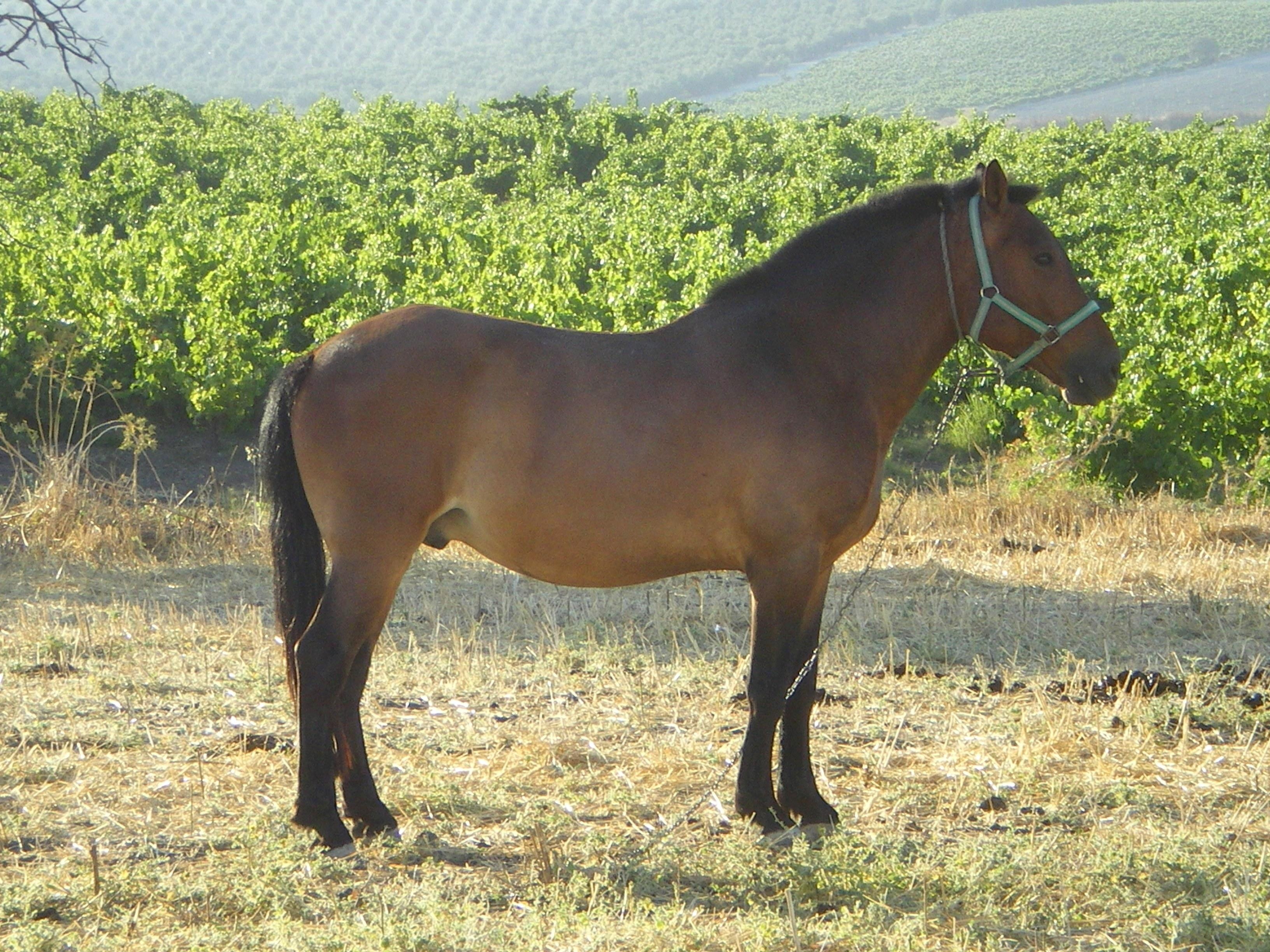 Aragonés: Caballo en Moriles, Cordoba.